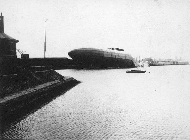 L 12 in Oostende Hafen bevor Explosion